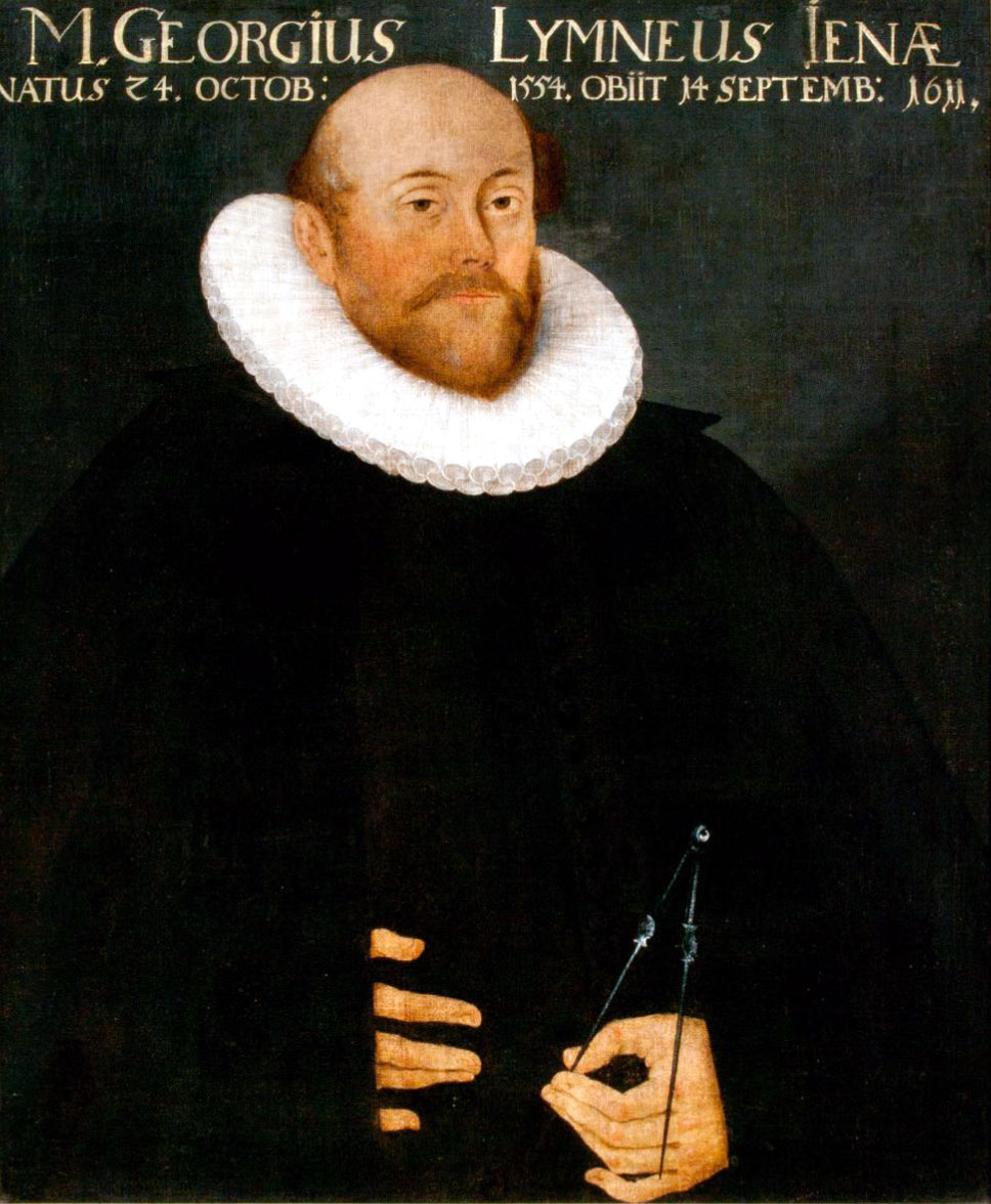 Georg Limneus auch: Wim (24. Oktober 1554-14. September 1611) deutscher Mathematiker, Astronom und Universitätsbibliothekar Jena, 1588-1611 Prof. math Jena, errichtete 1596 die erste Sternwarte in Jena, 1581 Mag., Hofmeister der Familie van Hutten an die Uni. Heidelberg, 5 Jahre später zurück in Jena, dort Prof Math, 2. Mal Rektor, verh. 3. Februar 1589 Anna Moratha, die Tochter des Pfarrers in Birckfeld Johann Beuning, Kinder Wolfgang und Johann